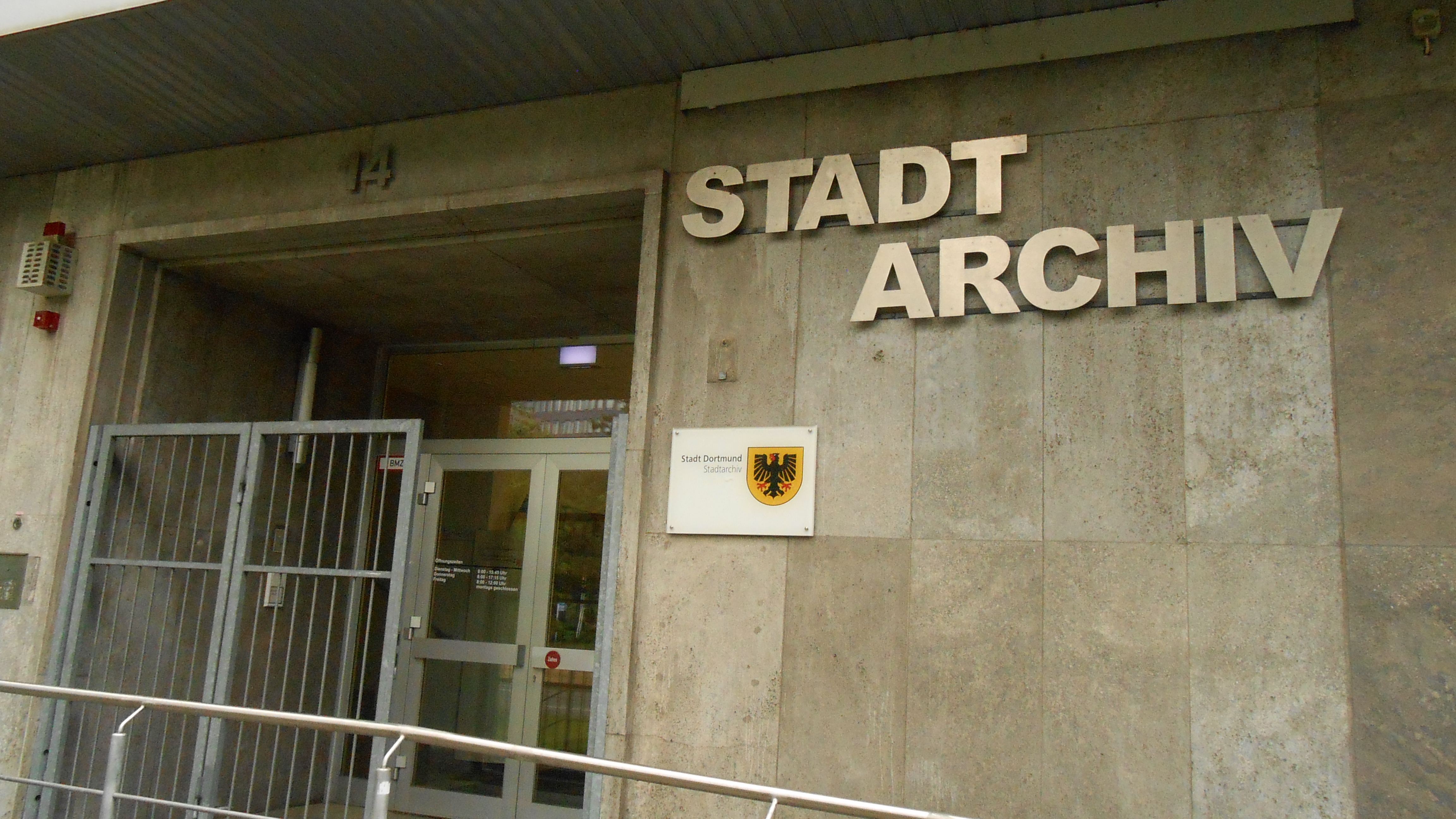 Eingang des Stadtarchivs Dortmund an der Märkischen Straße, gegenüber dem S- und U-Bahnhof Stadthaus.